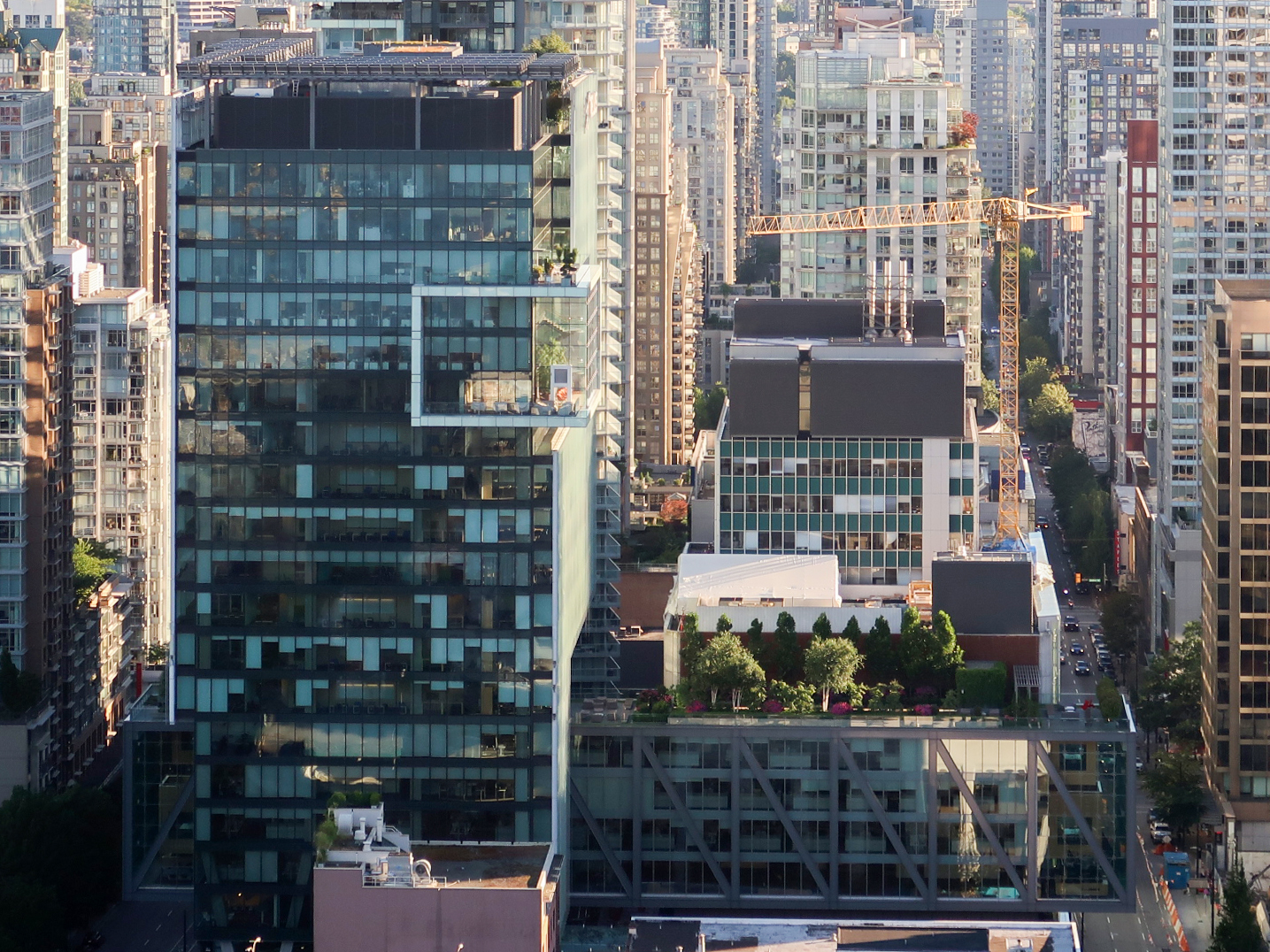 Telus Garden